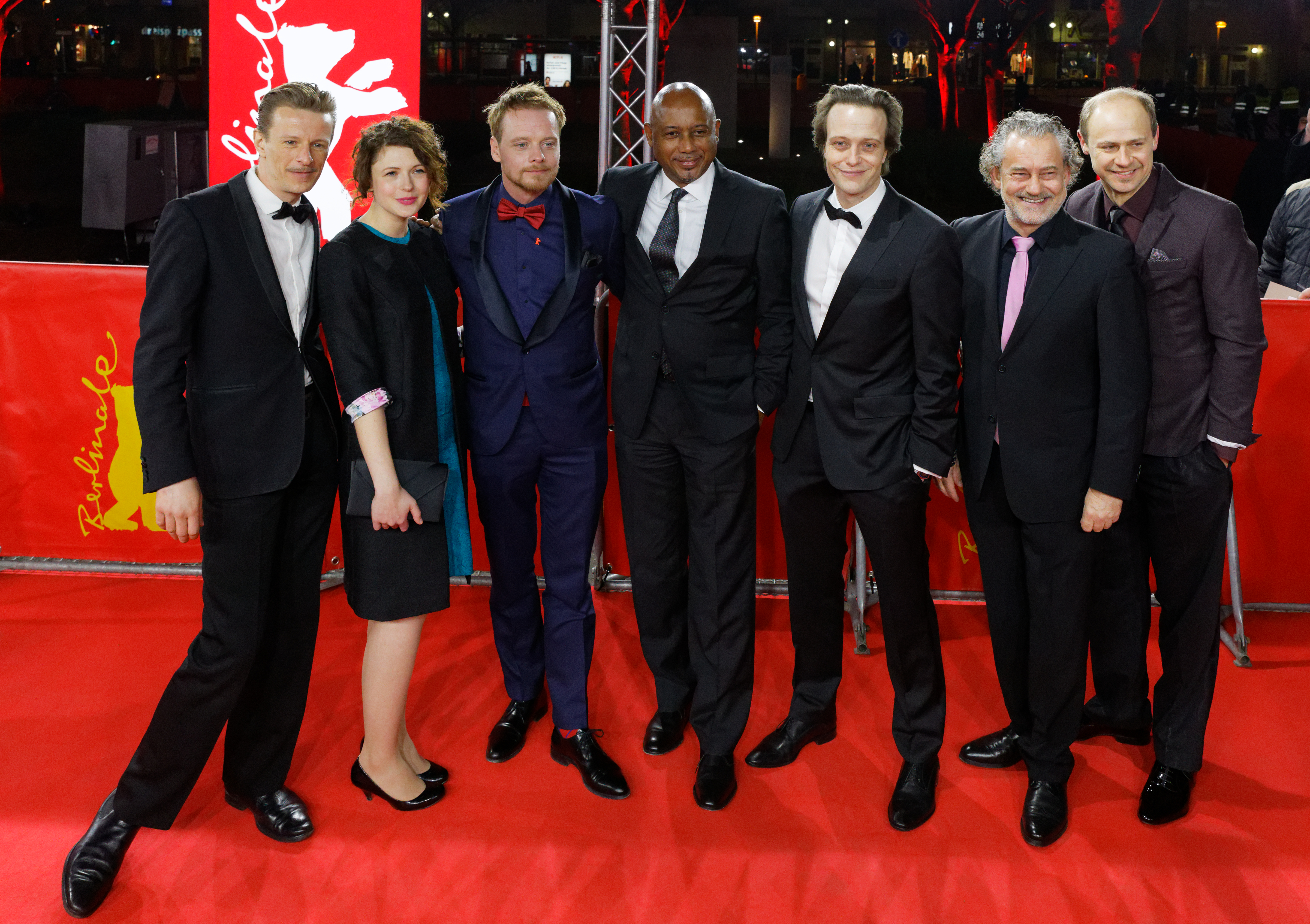 Cast & Crew bei der Weltpremiere von Der junge Karl Marx bei der Berlinale 2017: v.l.n.r. Alexander Scheer, Hannah Steele, Stefan Konarske, Raoul Peck, August Diehl, Rolf Kanies und Moritz Führmann